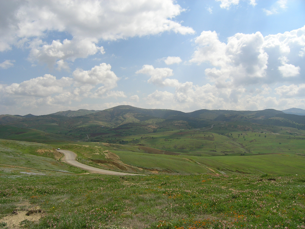 photo prise le 30 03 2007